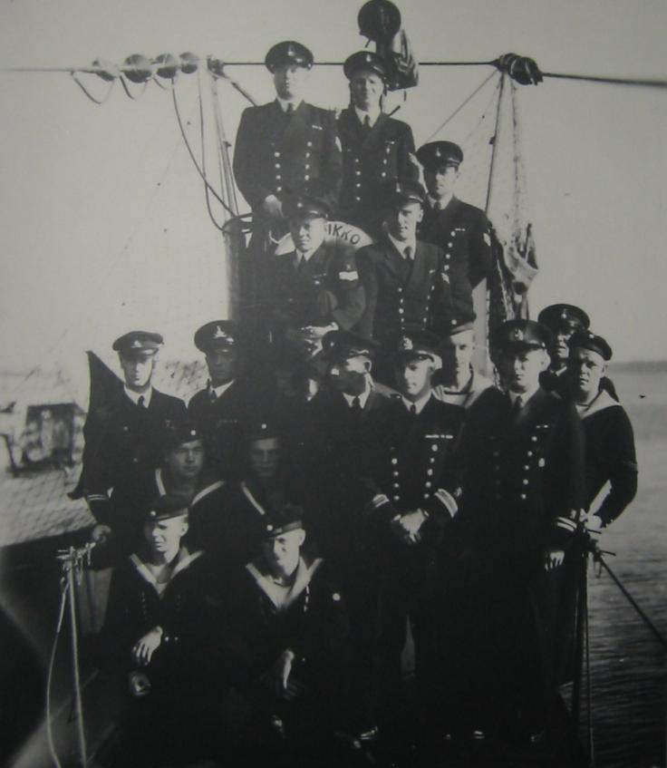 Submarine Vesikko